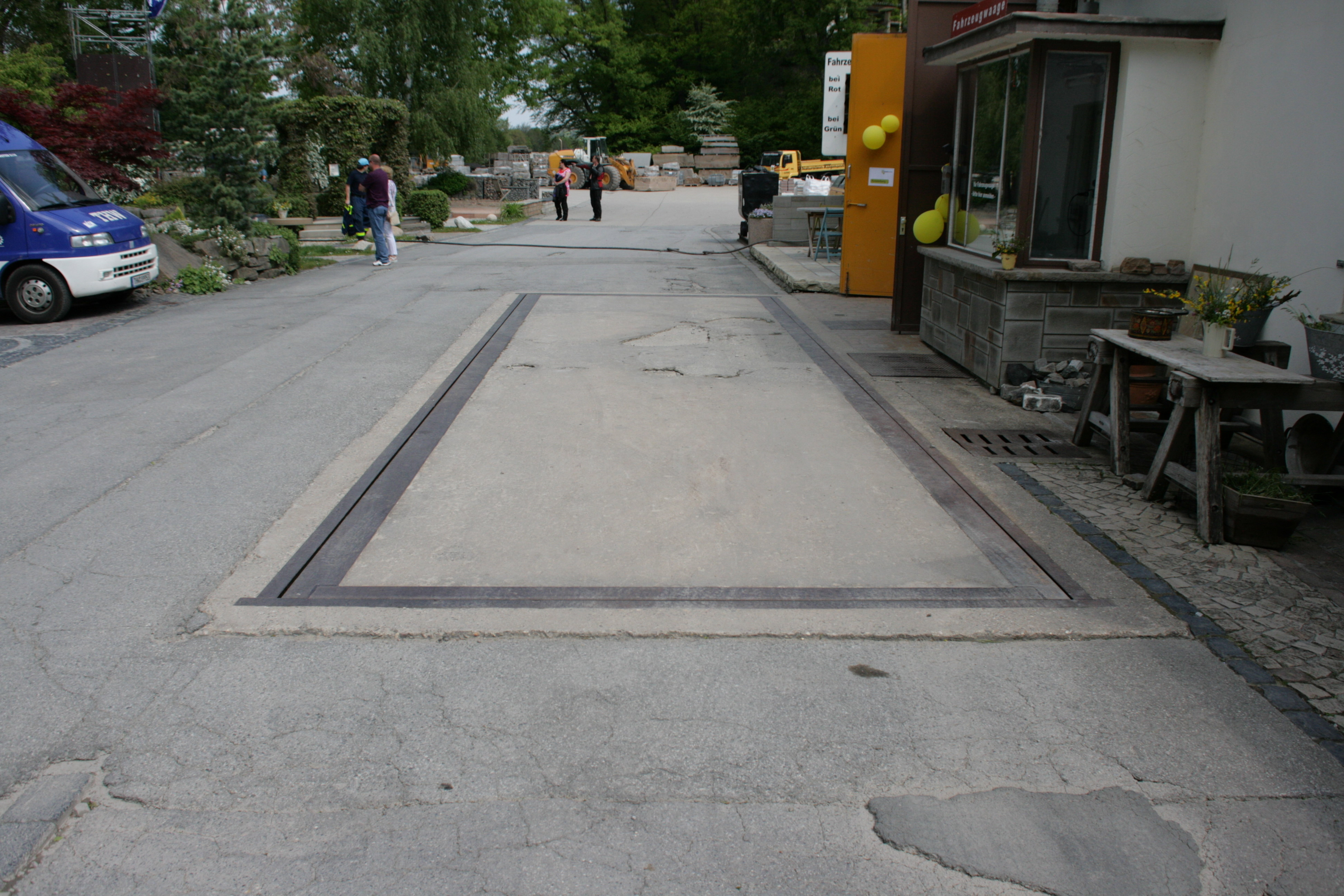 Schachtzeichen bei der ehemaligen Zeche Neuwülfingsburg, jetzt Fa. Naturstein Külpmann in Wetter (Ruhr)